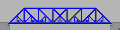 Baltimore Fachwerk Brücke